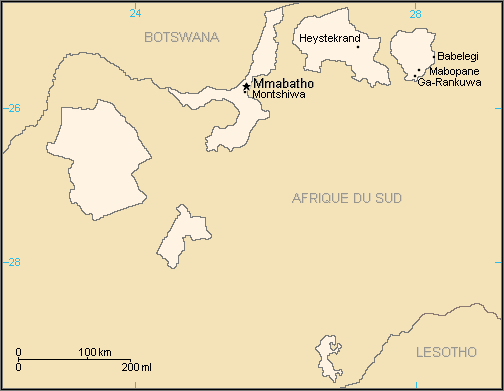 Carte du bantoustan Bophuthatswana, Afrique du Sud.